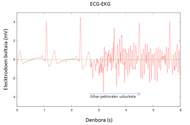 Zarata mioelektrikoa EKG-ECGan.